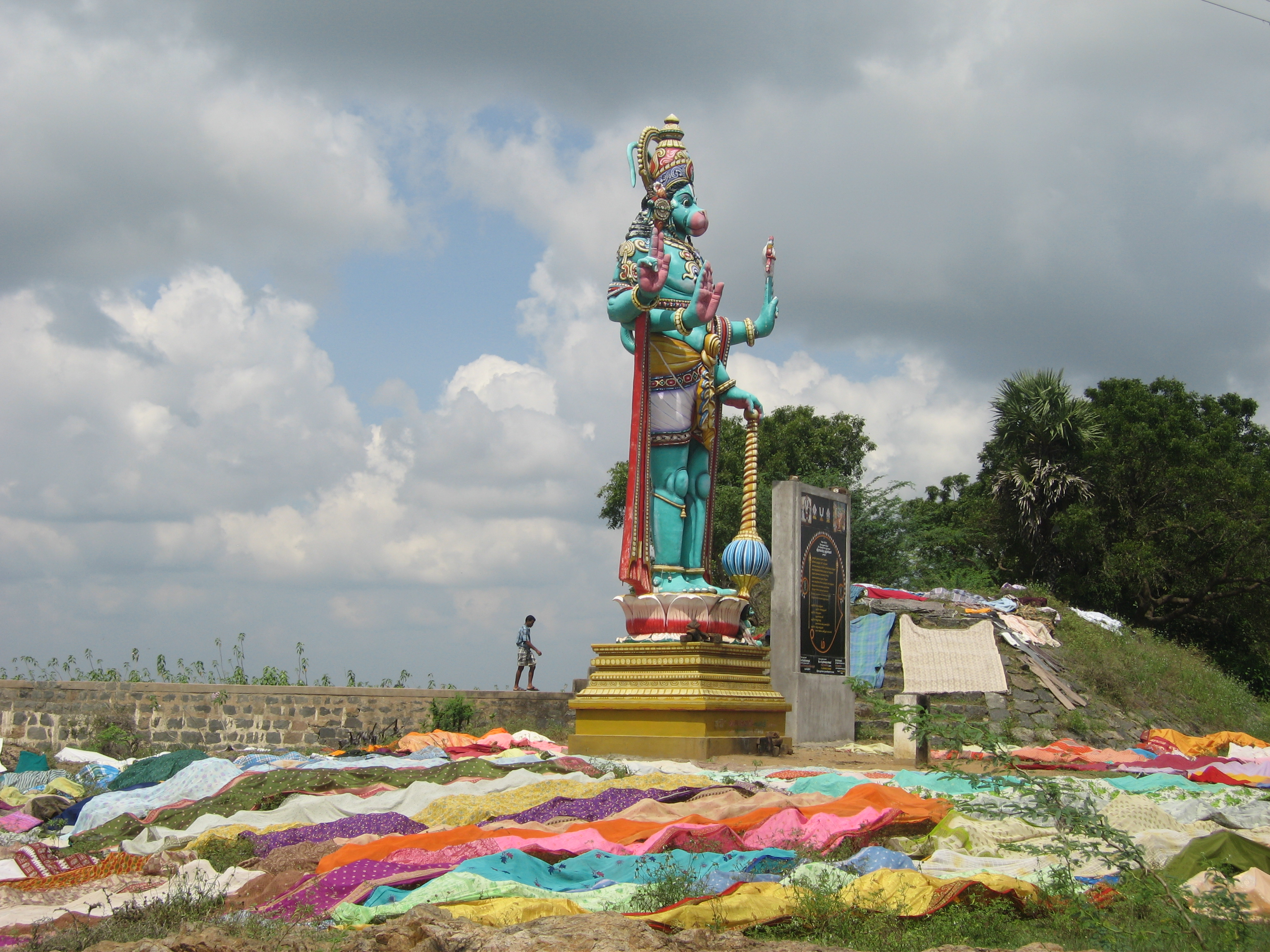 சலவை செய்யப்பட்ட துணிகளை உலர்த்துதல்.